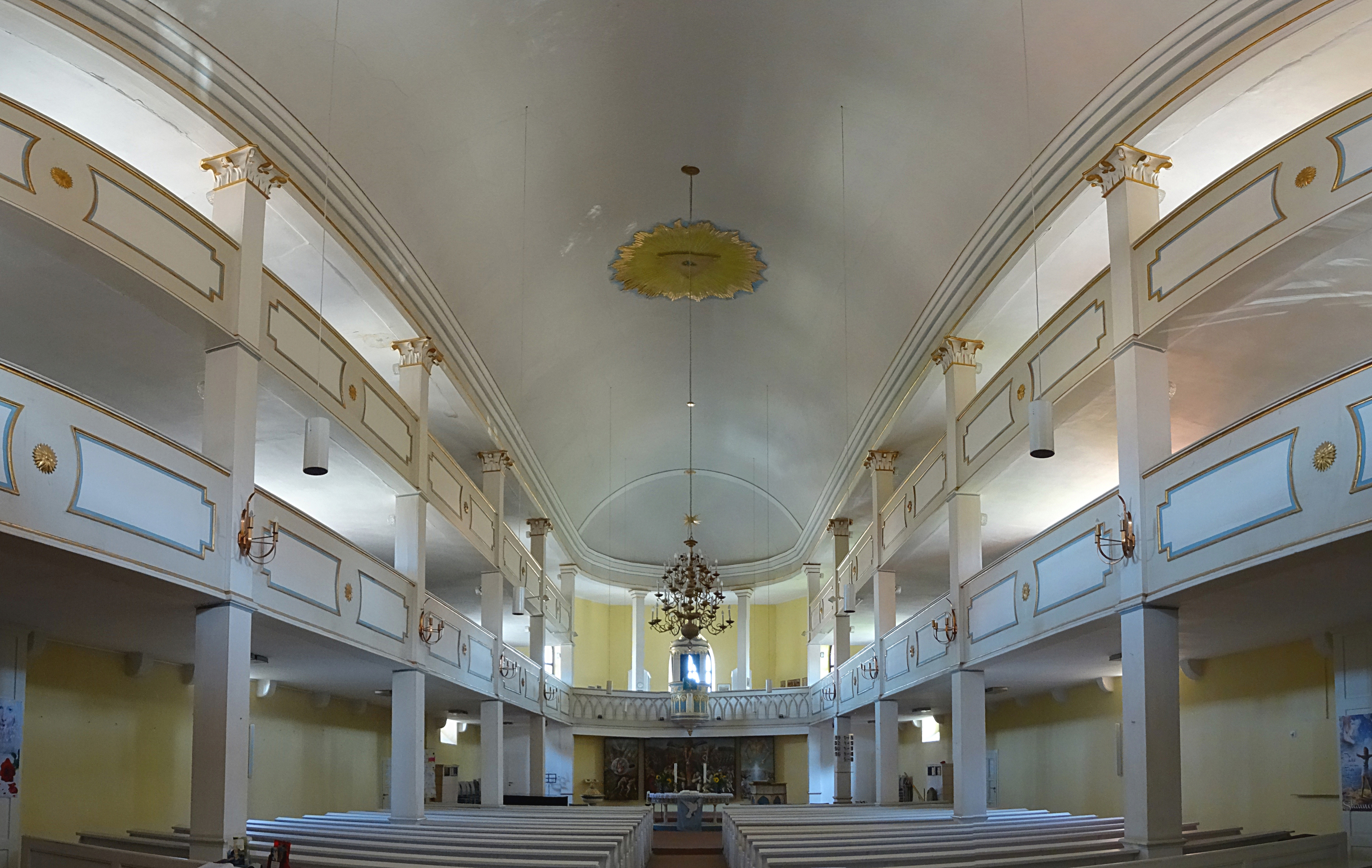 Innenraum Panorama Sankt Trinitatiskirche Herbsleben